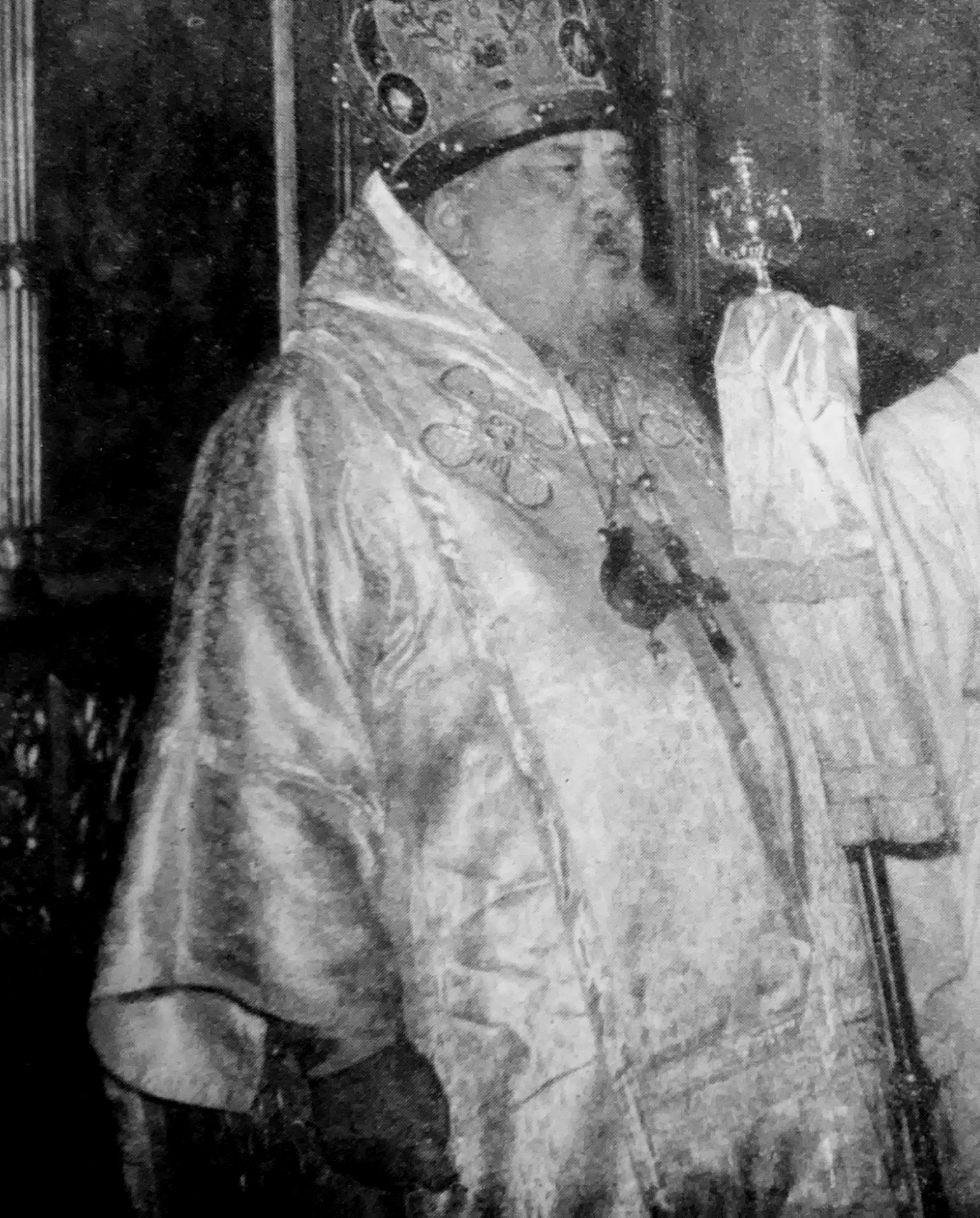 Metropolita warszawski i całej Polski Tymoteusz przemawia na pogrzebie swojego poprzednika, Makarego